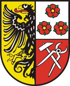 Dolní Poustevna znak